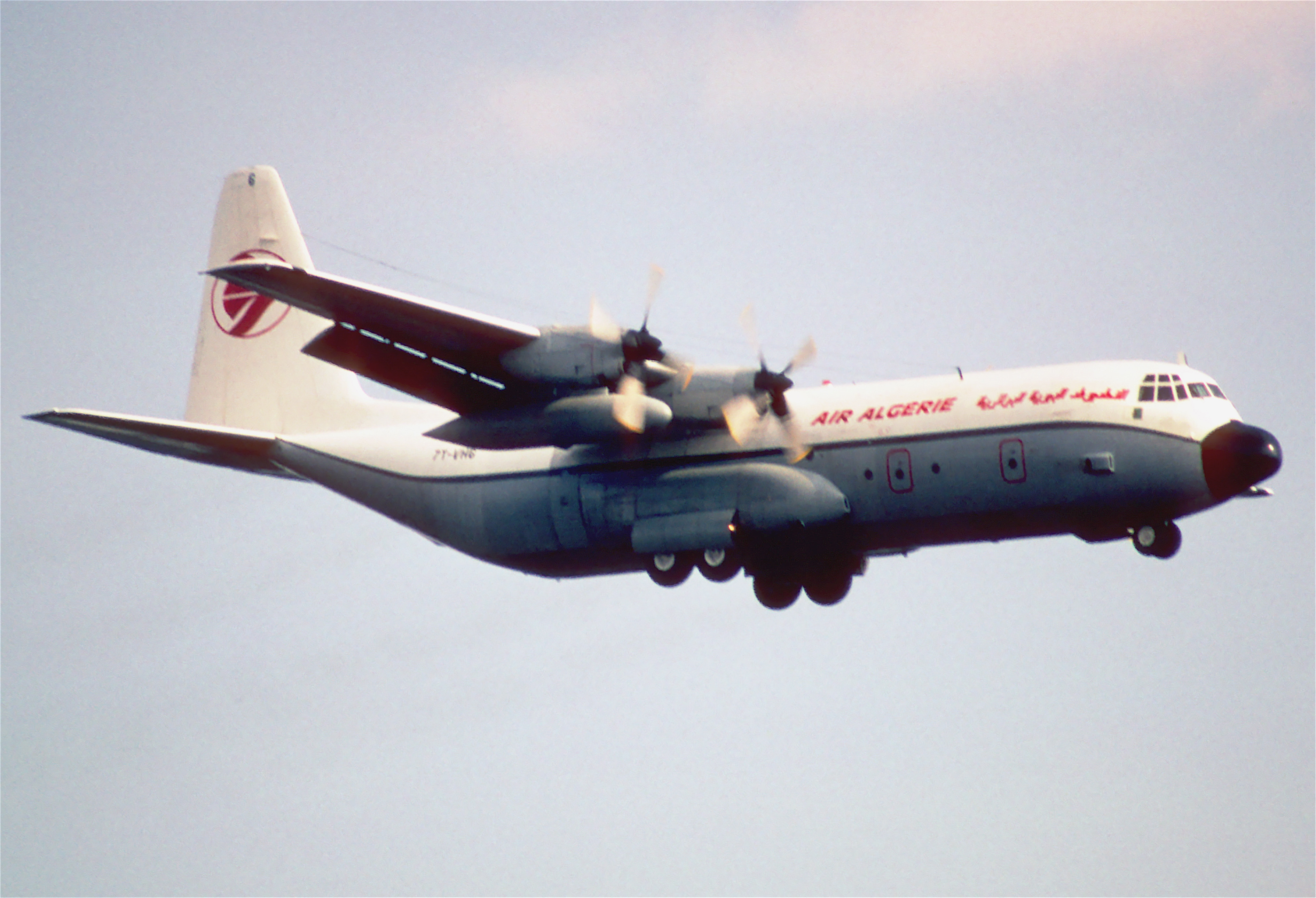 19ch - Air Algérie Lockheed L-382G Hercules; 7T-VHG@FRA;02.04.1998